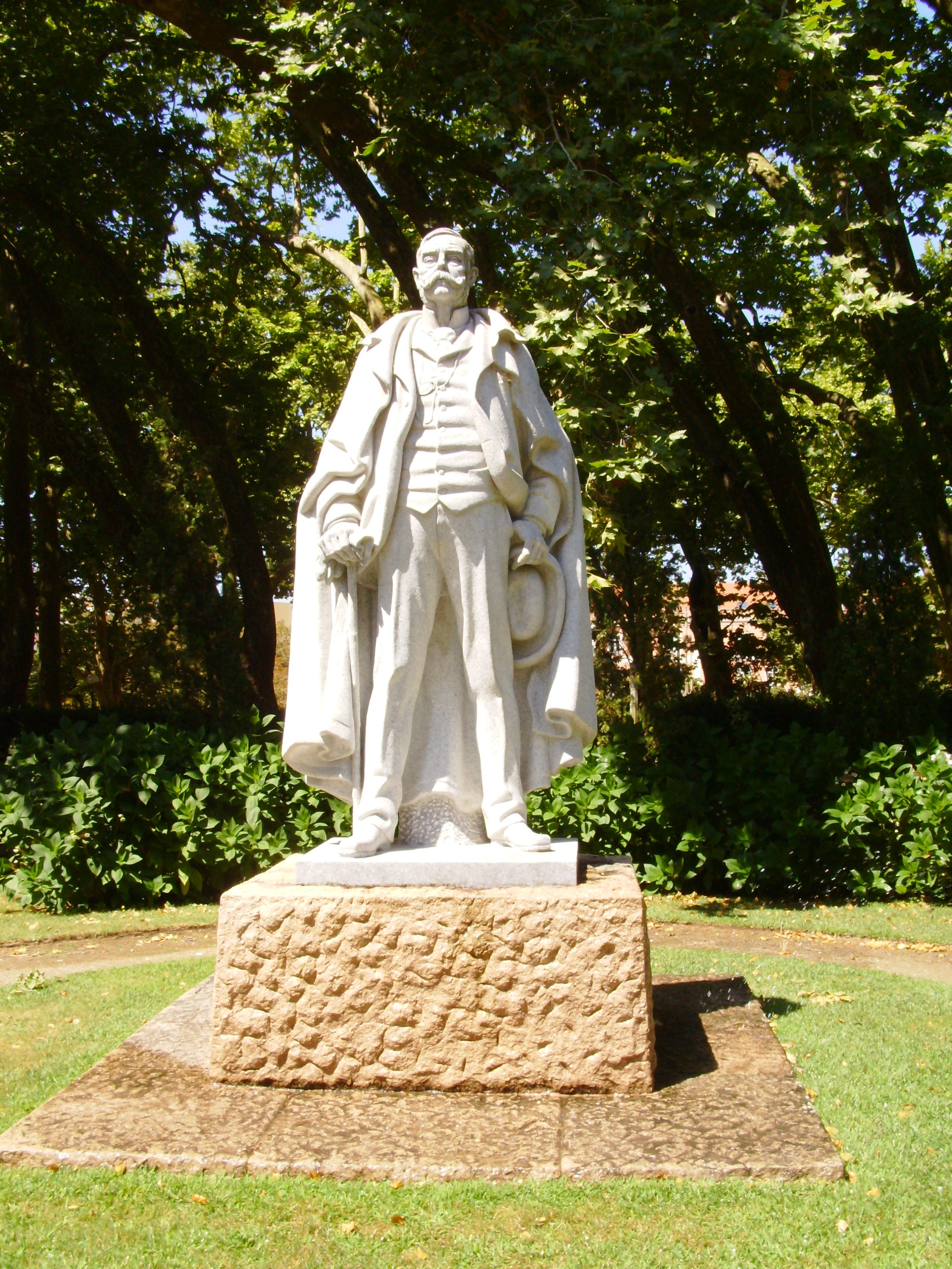 Estátua de Ramalho Ortigão por Leopoldo de Almeida. Parque D. Carlos I, Caldas da Rainha, Distrito de Leiria, Portugal.